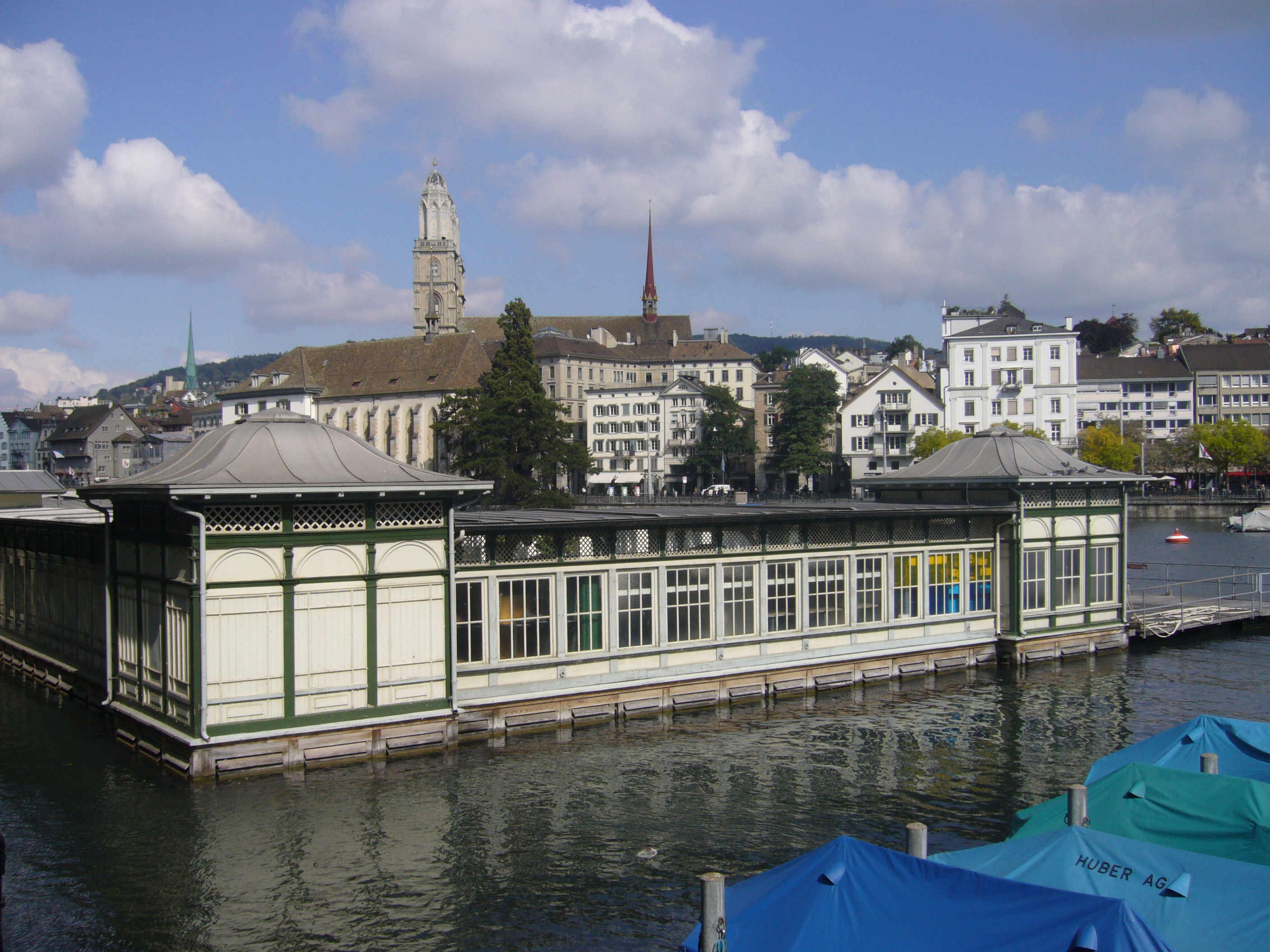 Frauenbad am Kaufhausquai; im Hindergrunde die Wasserkirche, das Großmünster und Häuser am Rathhausquai .